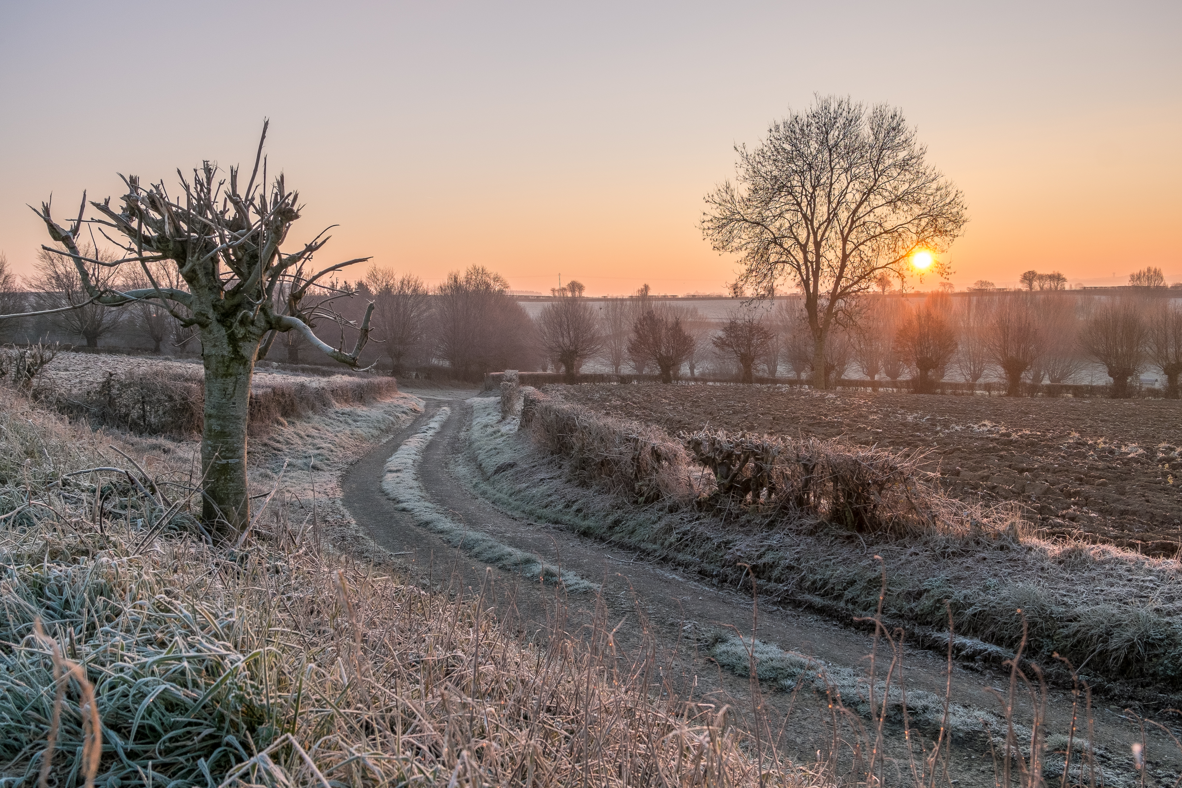 La température était descendue aux alentours de -7° ce matin-là.